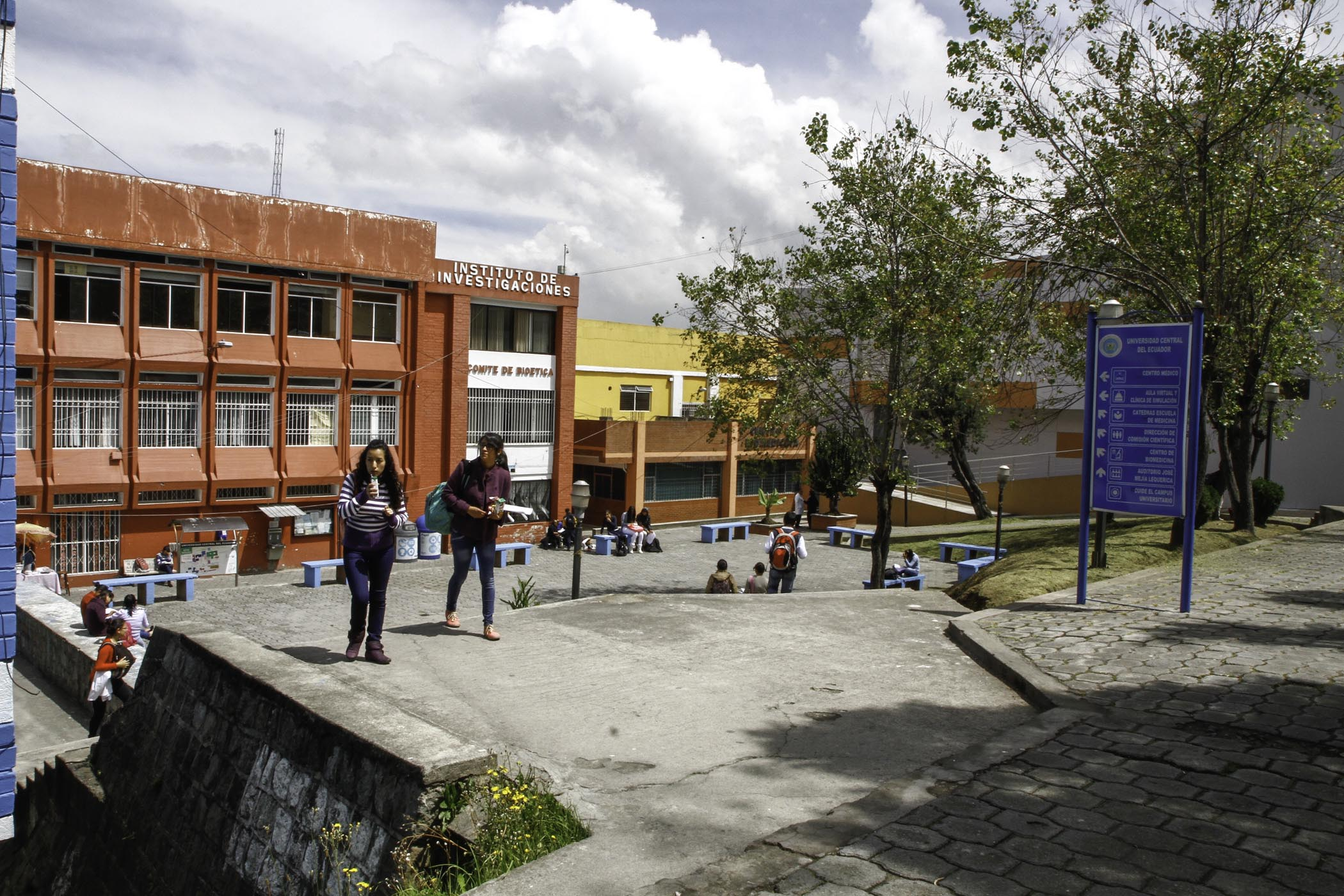 Quito, 18 feb (Andes).- El 16 de noviembre de 2014, 1.100 estudiantes de la Facultad de Medicina de la Universidad Central del Ecuador (UCE) rindieron el Examen Nacional de Habilitación para el Ejercicio Profesional. El 92,2% de ellos aprobó, lo que confirma a ese centro de estudios como uno de los mejores en el campo de la Medicina. Foto: Micaela Ayala V./Andes